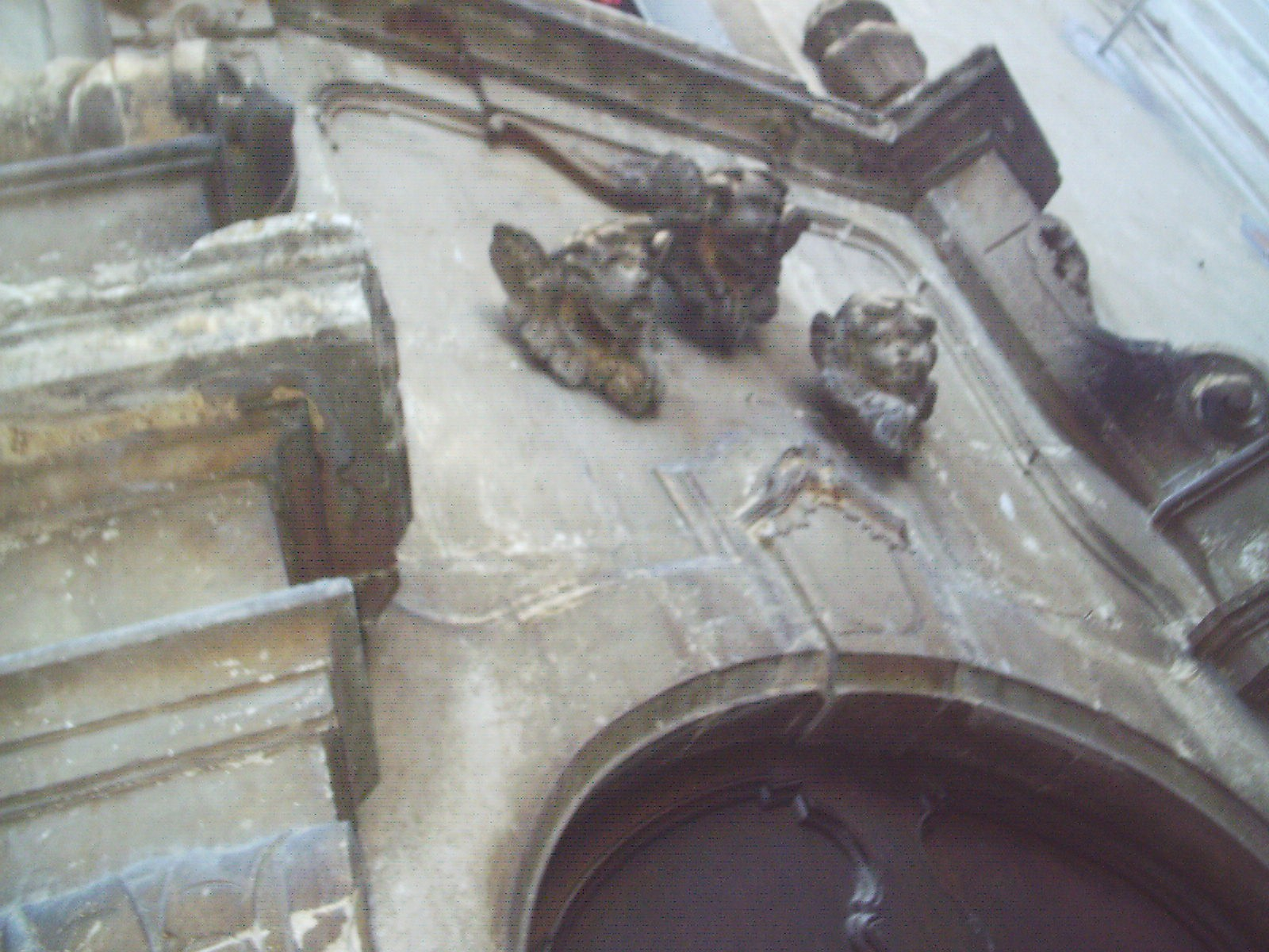 Portale di Palazzo Serafini(Scanno, provincia dell'Aquila)